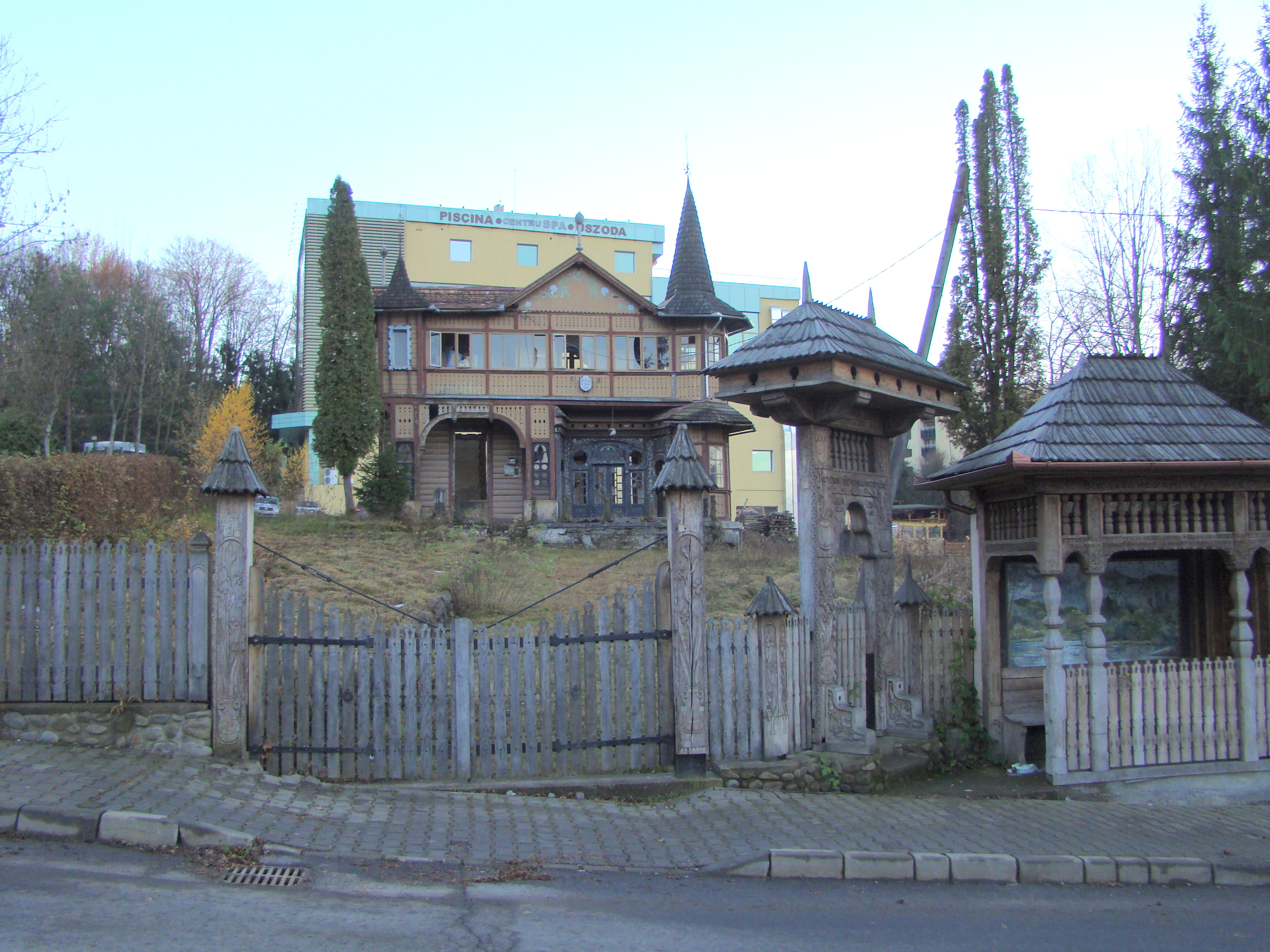 Casa Bernady oraș Sovata Str. Trandafirilor 133